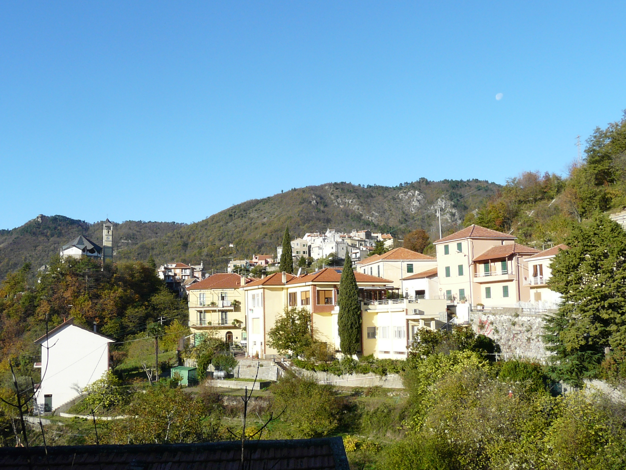 Il moderno abitato di Balestrino, Liguria, Italia